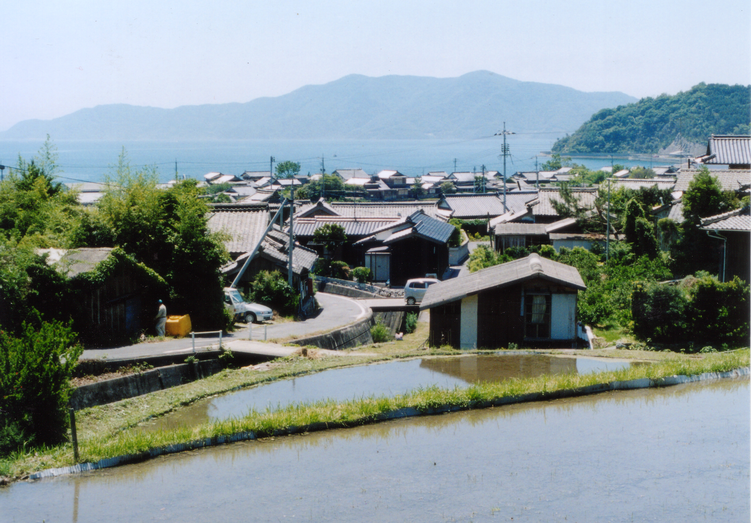 Agenosho village, Yashirojima, Yamaguchi, Japan.